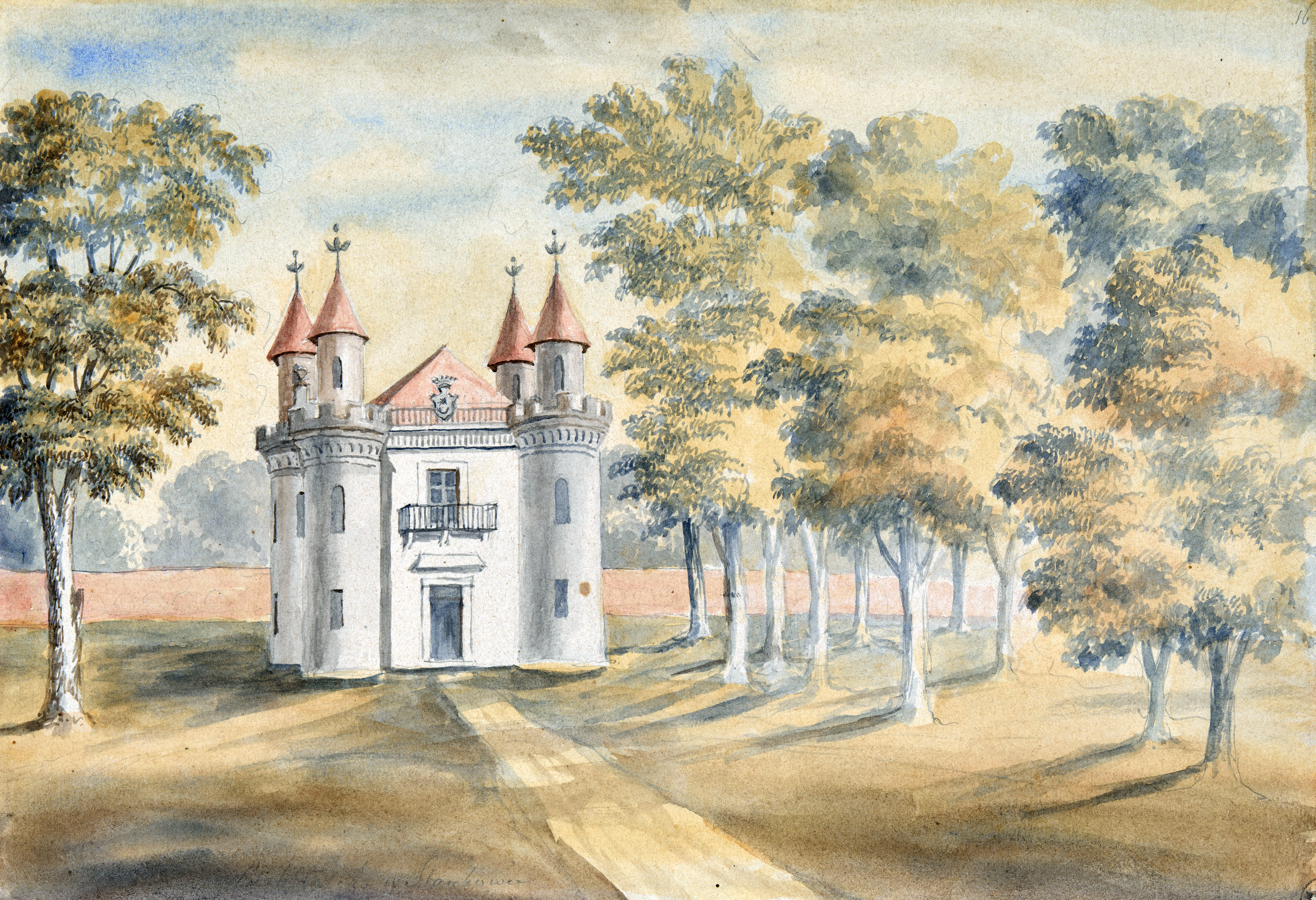 Беларуская (тарашкевіца): Станькаў (Stańkaŭ), сядзіба Чапскіх (Čapski). Скарбчык (Skarbčyk)